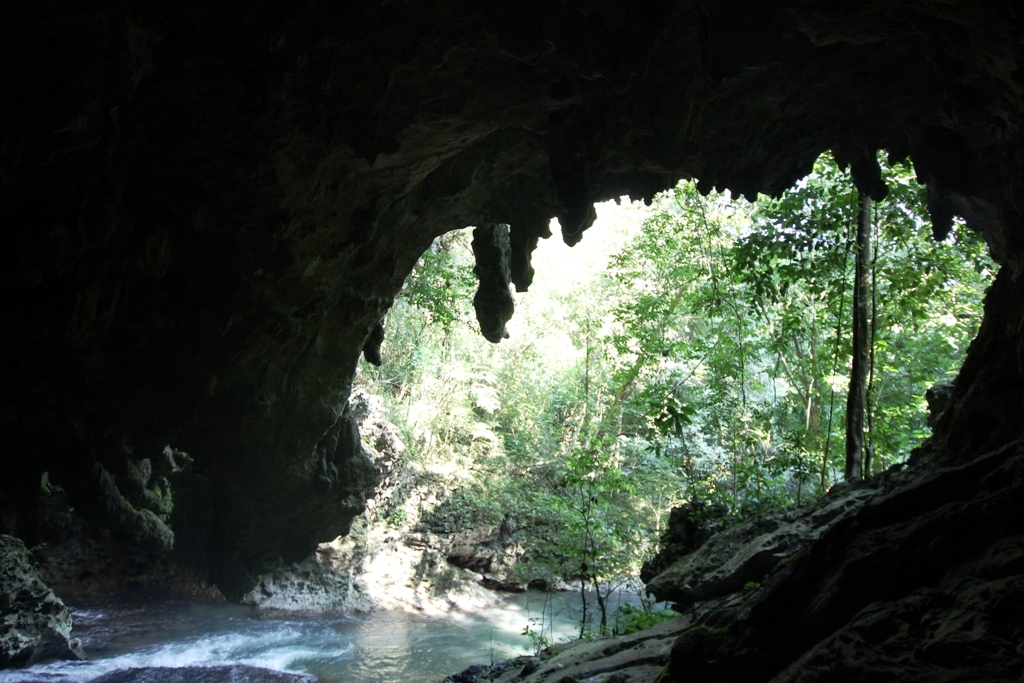 CuevasCandelaria2